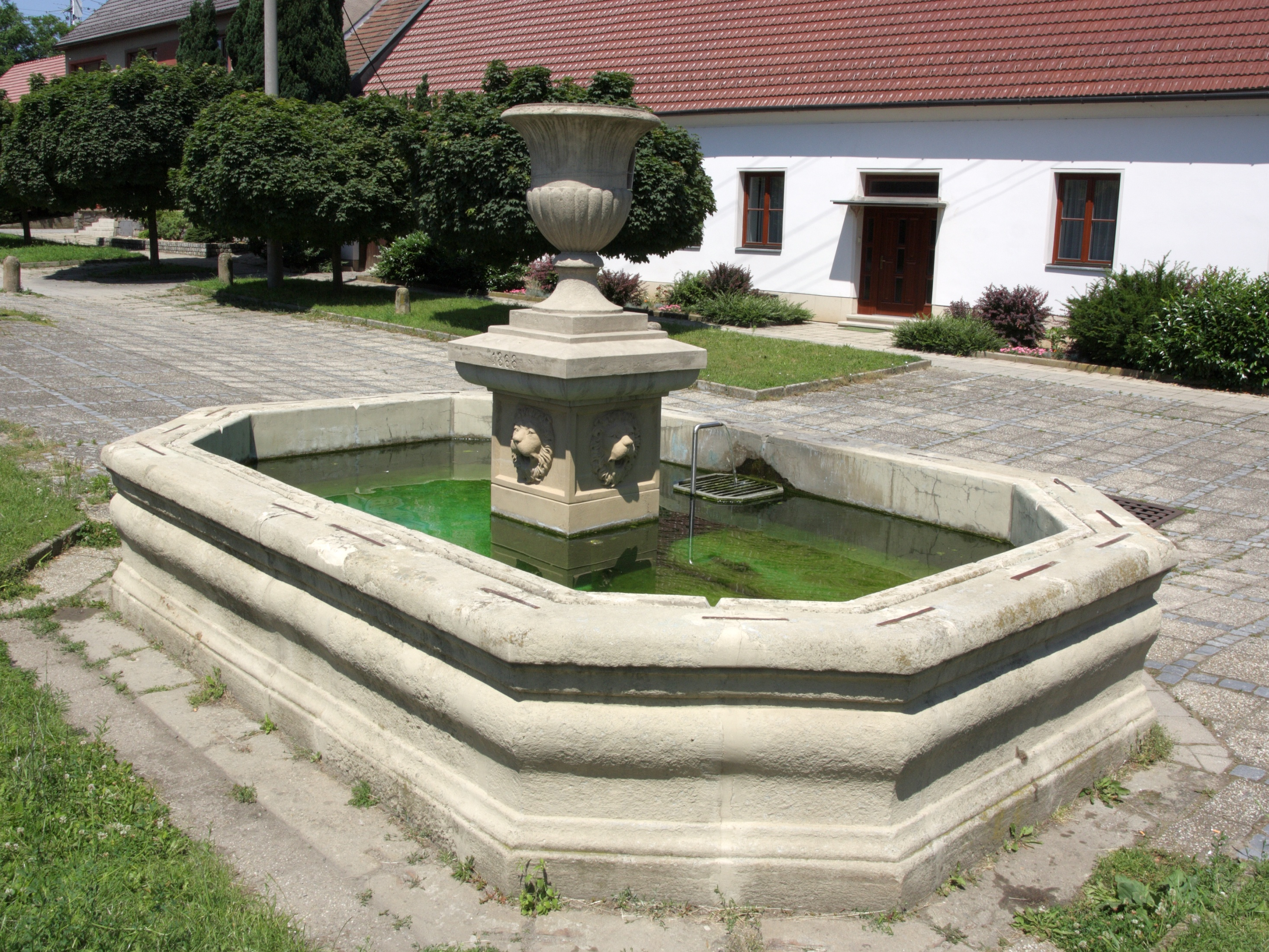 Rajhrad - kašna na náměstí.